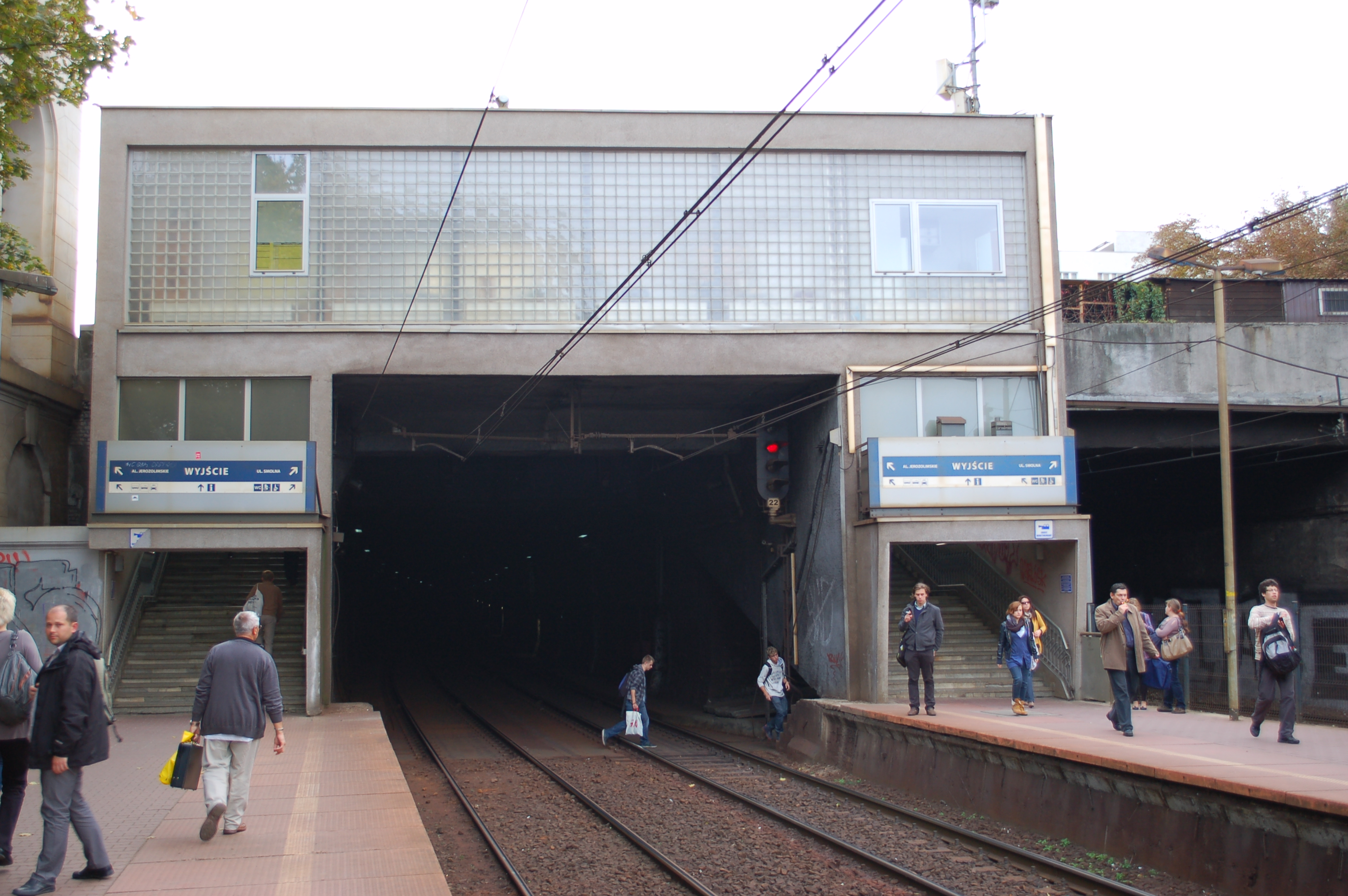 Warschau Powiśle.